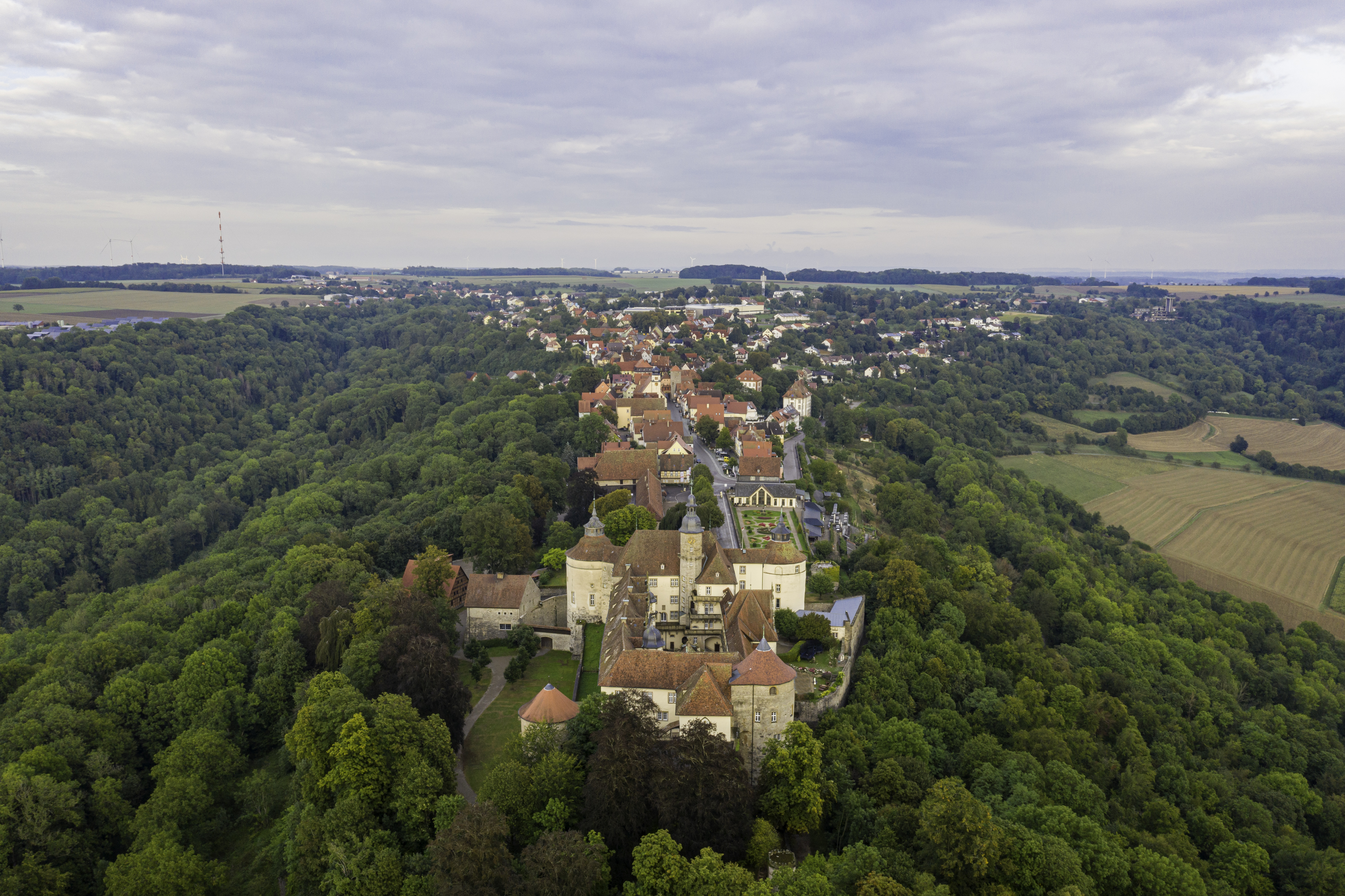 Langenburg mit dem Schloss im Vordergrund